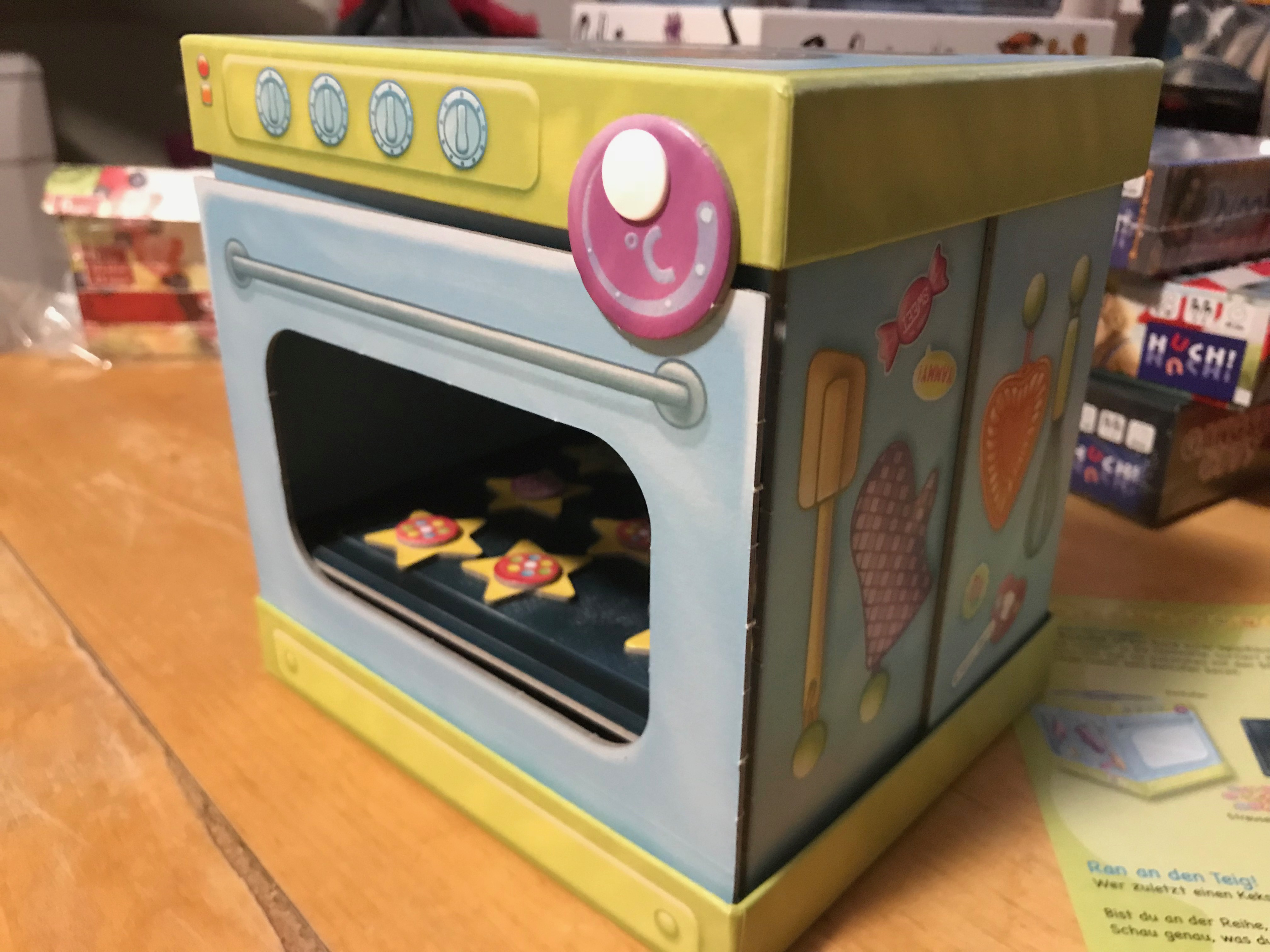 Spielmaterial des Spiels Cookies